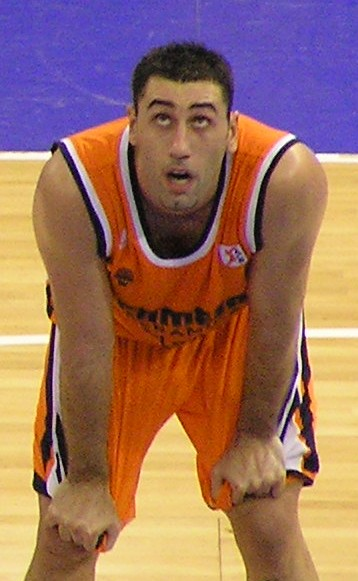 Dimosthenis Dikoudis en 2008, amb l'aleshores Pamesa València.